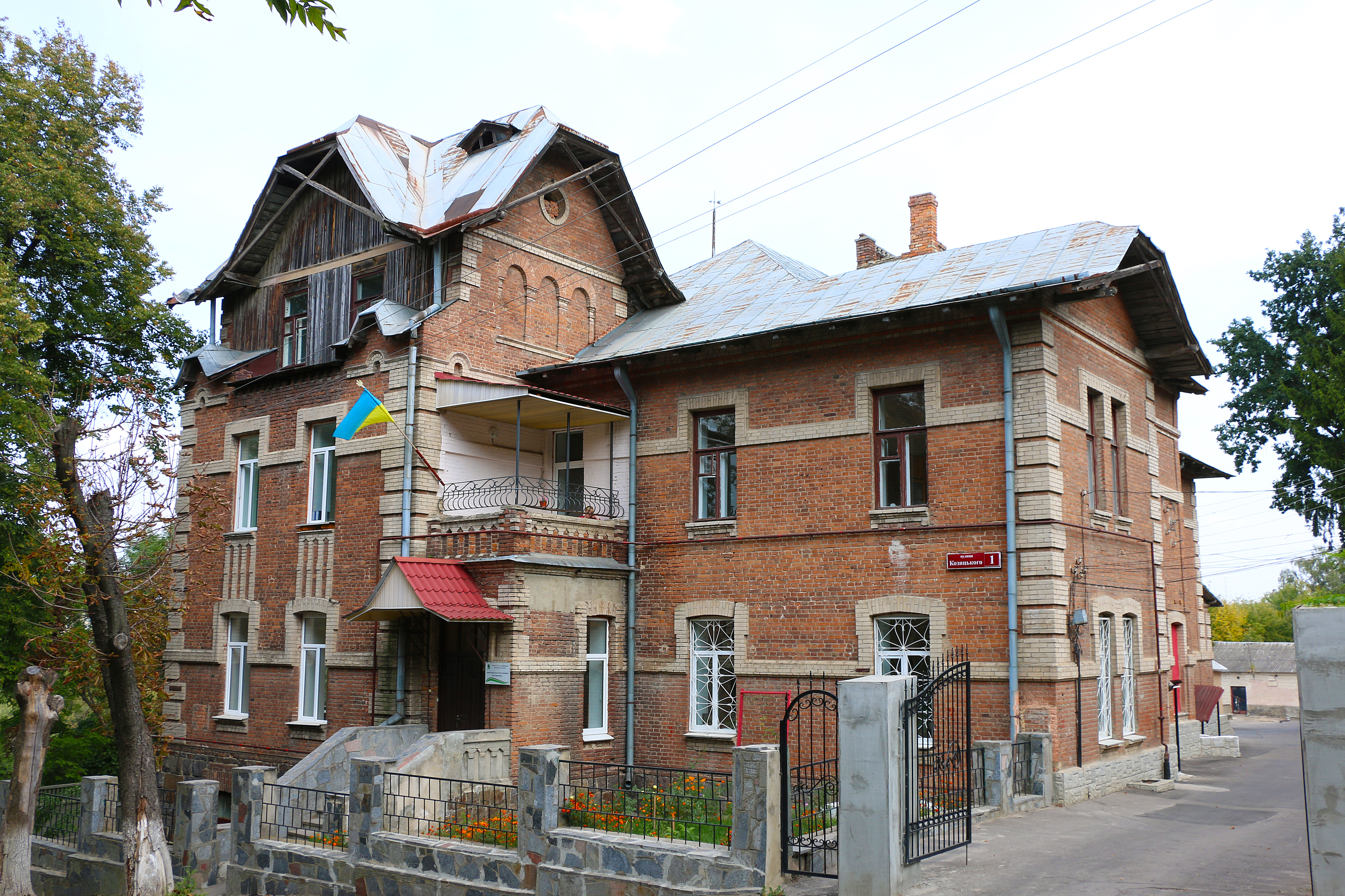 Особняк-лікарня (Палац), Вінниця, вул. Козицького, 1